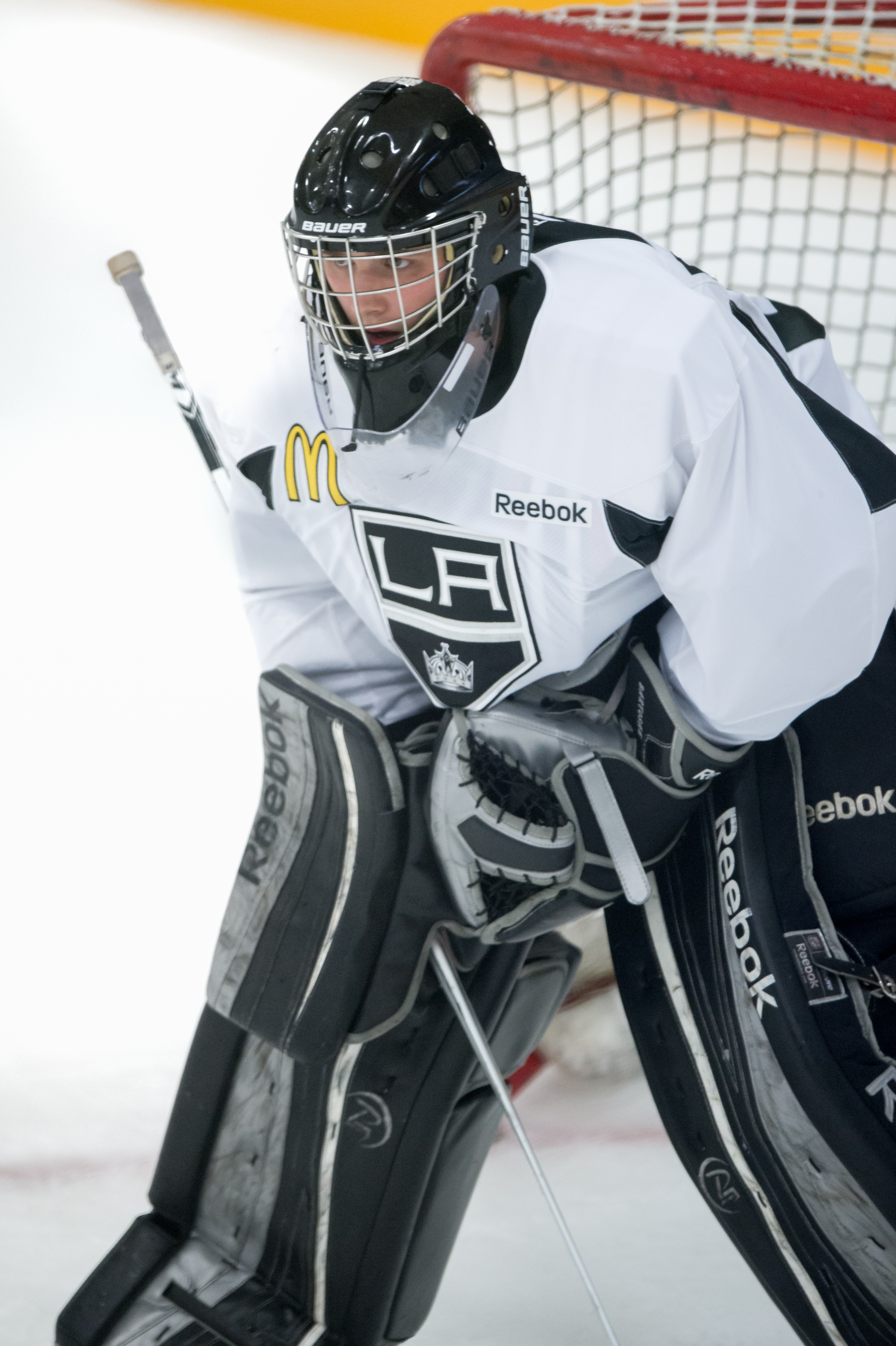 Patrik Bartošák, Czech ice hockey goaltender